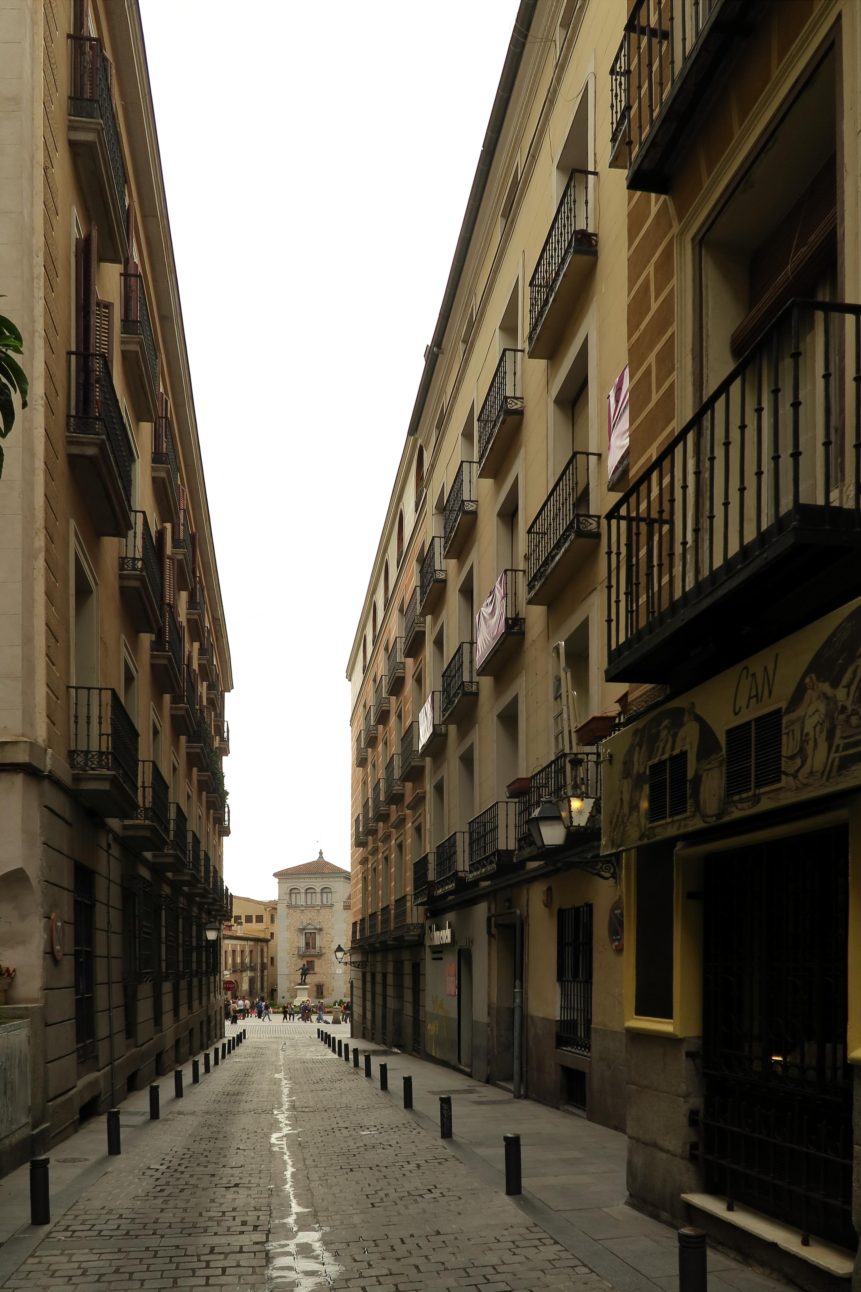 Calle de los Señores de Luzón, desde el número 4